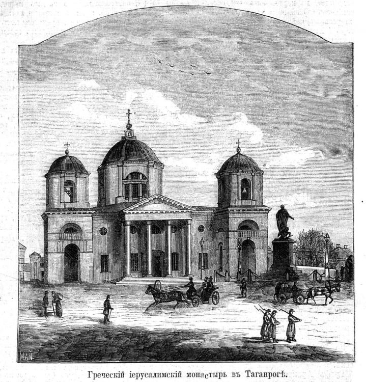 Александро-Невский Иерусалимский греческий мужской монастырь в городе Таганроге Россия